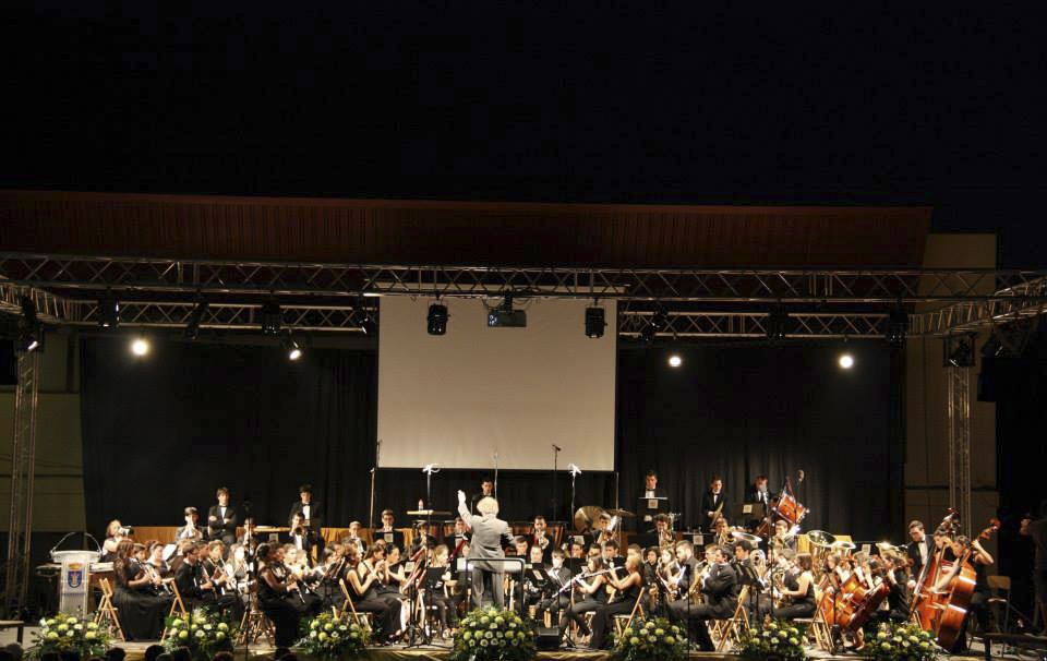 Banda de Música Municipal de Valga no Certame Internacional Villa Dosbarrios